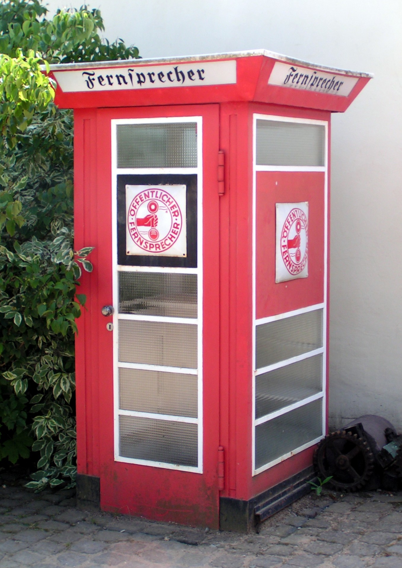 Beschreibung: Fernsprechhäuschen vom Typ FeH32 auf dem Roscheider Hof bei Konz (1. August 2004) Quelle: selbst erstellt Fotograf: Stefan Kühn